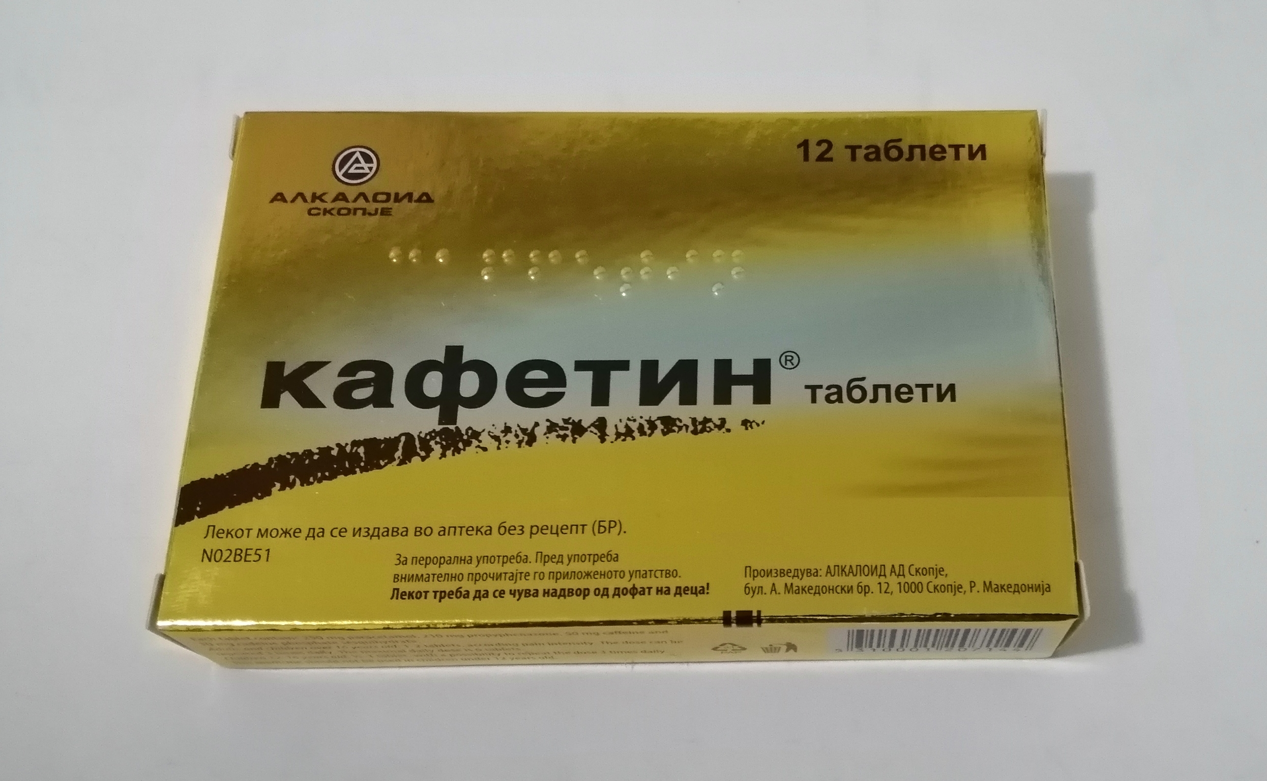 Кафетин таблети произведени од Алкалоид